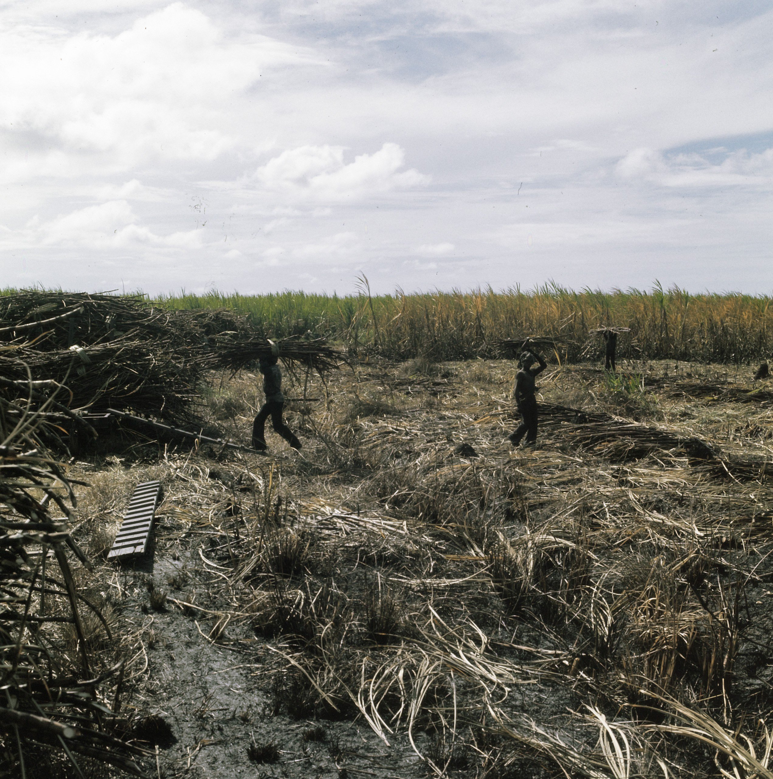 Collectie / Archief : Fotocollectie Anefo Reportage / Serie : [ onbekend ] Beschrijving : Suikerrietplantages in Suriname Datum : 1975 Locatie : Suriname Trefwoorden : plantages, suiker Fotograaf : Verhoeff, Bert / Anefo Auteursrechthebbende : Nationaal Archief Materiaalsoort : Dia (kleur) Nummer archiefinventaris : bekijk toegang 2.24.01.07 Bestanddeelnummer : 254-9645